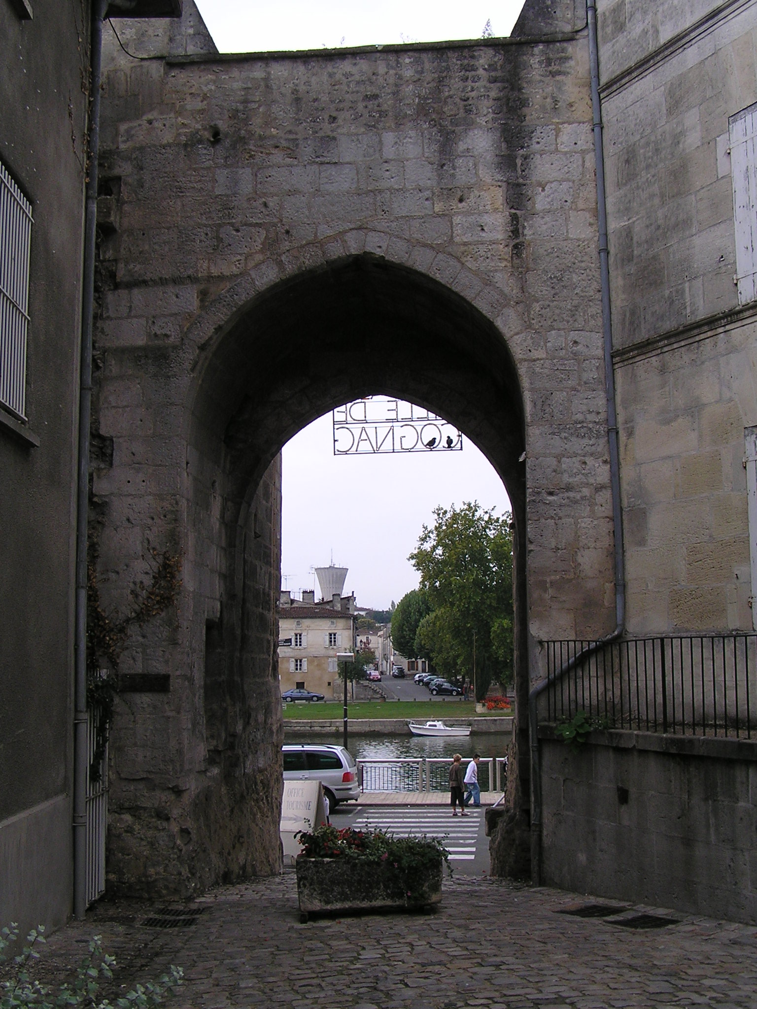 porte de la ville de Cognac, depuis la ville en regardant le fleuve et le quartier Saint-Jacques sur l'autre rive